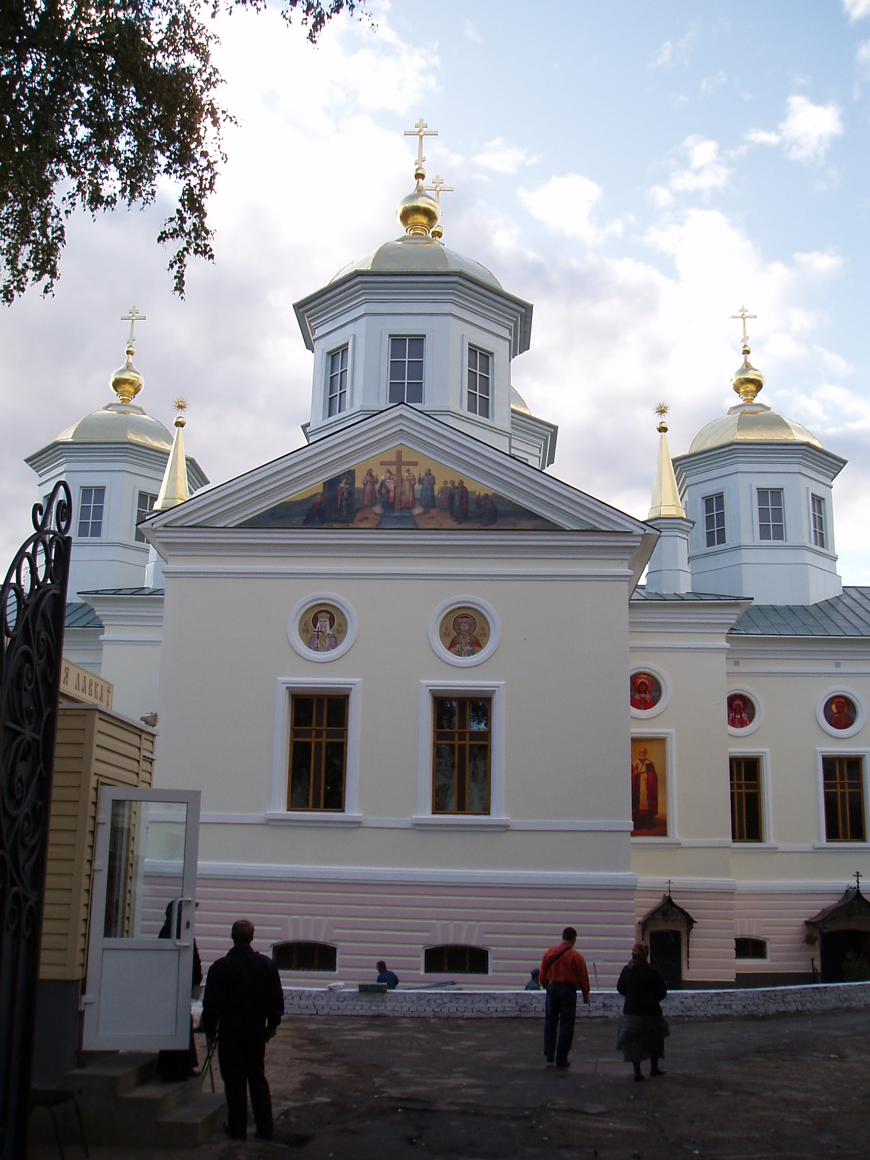 Крестовоздвиженский собор в престольный праздник 2009 года